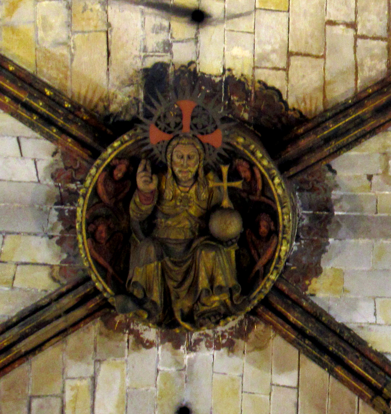 Clave de bóveda Padre Eterno de la catedral de Barcelona